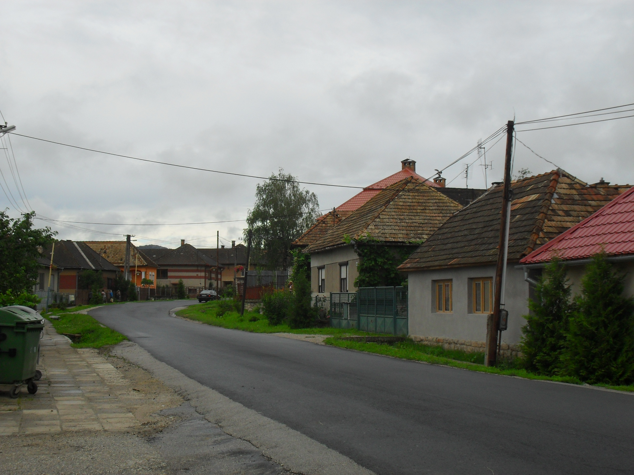 Gice - utcakép